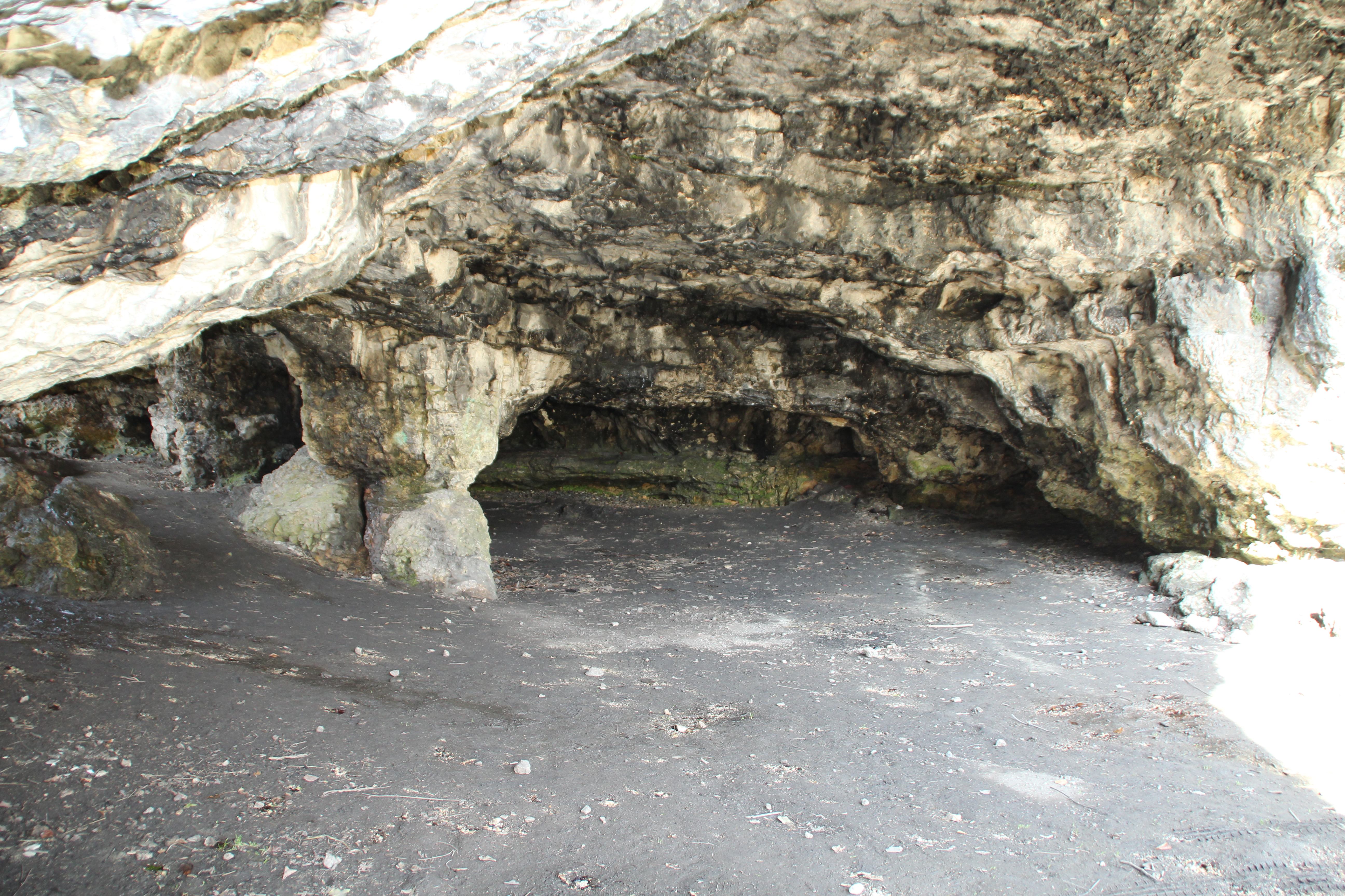 Kesslerloch 2013